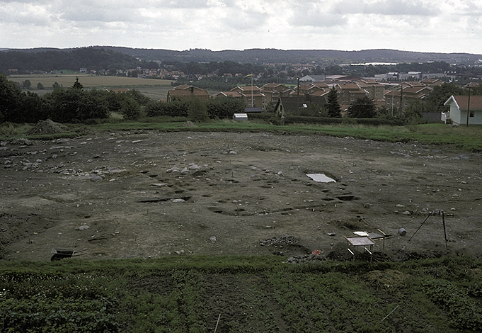 Sannolikt hugrund, osäker datering.